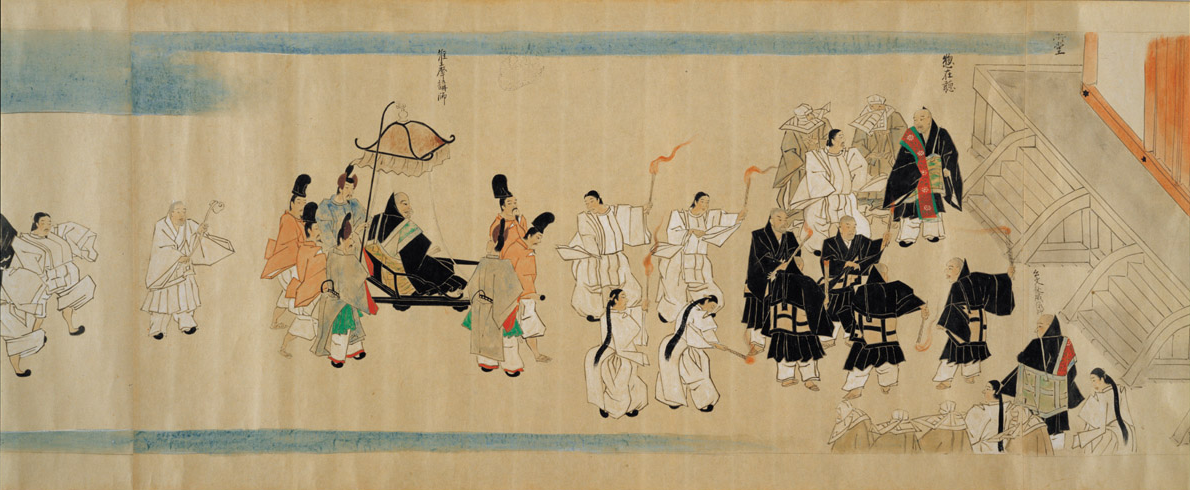 Tengu zoshi emaki. Détail du rouleau du Kofuku-ji.